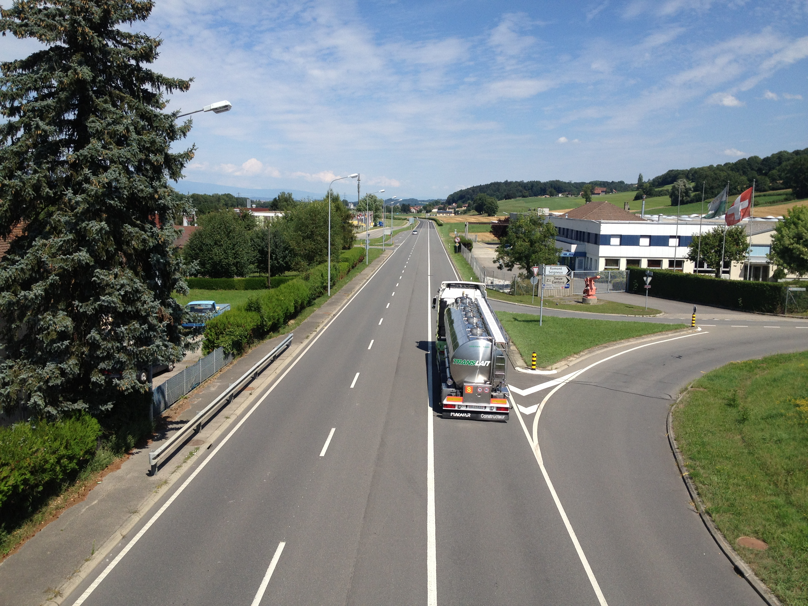 La route nationale suisse 1 à Treize-Cantons (commune de Valbroye) entre Moudon et Payerne.